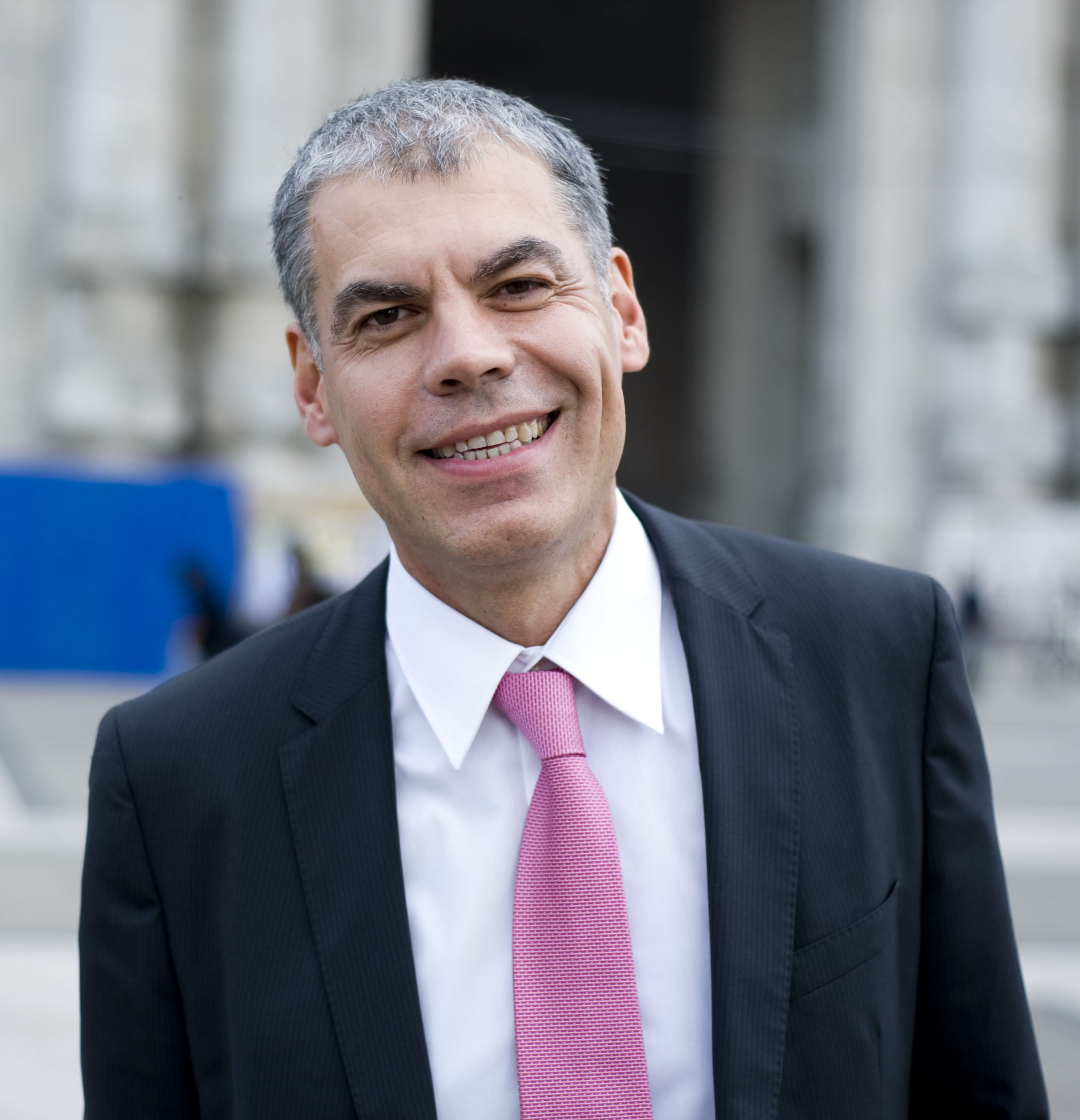 FOTO DI ALESSANDRO POGGI